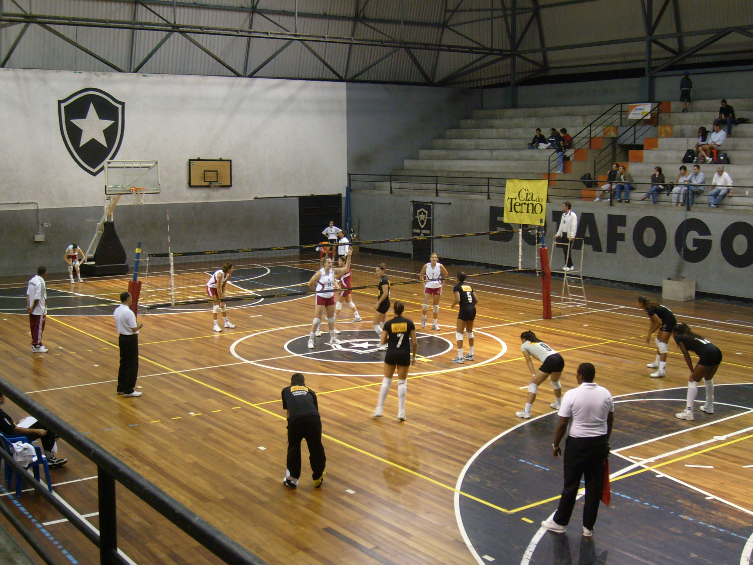 Partida de voleibol no Ginásio de General Severiano, entre Botafogo de Futebol e Regatas e Fluminense Football Club. Válida pela semifinal do Campeonato Carioca Feminino de Vôlei Profissional de 2008, vitória do Botafogo/Cia do Terno por 3-0, classificando para a final contra o Rexona/Ades (posteriormente o campeão).